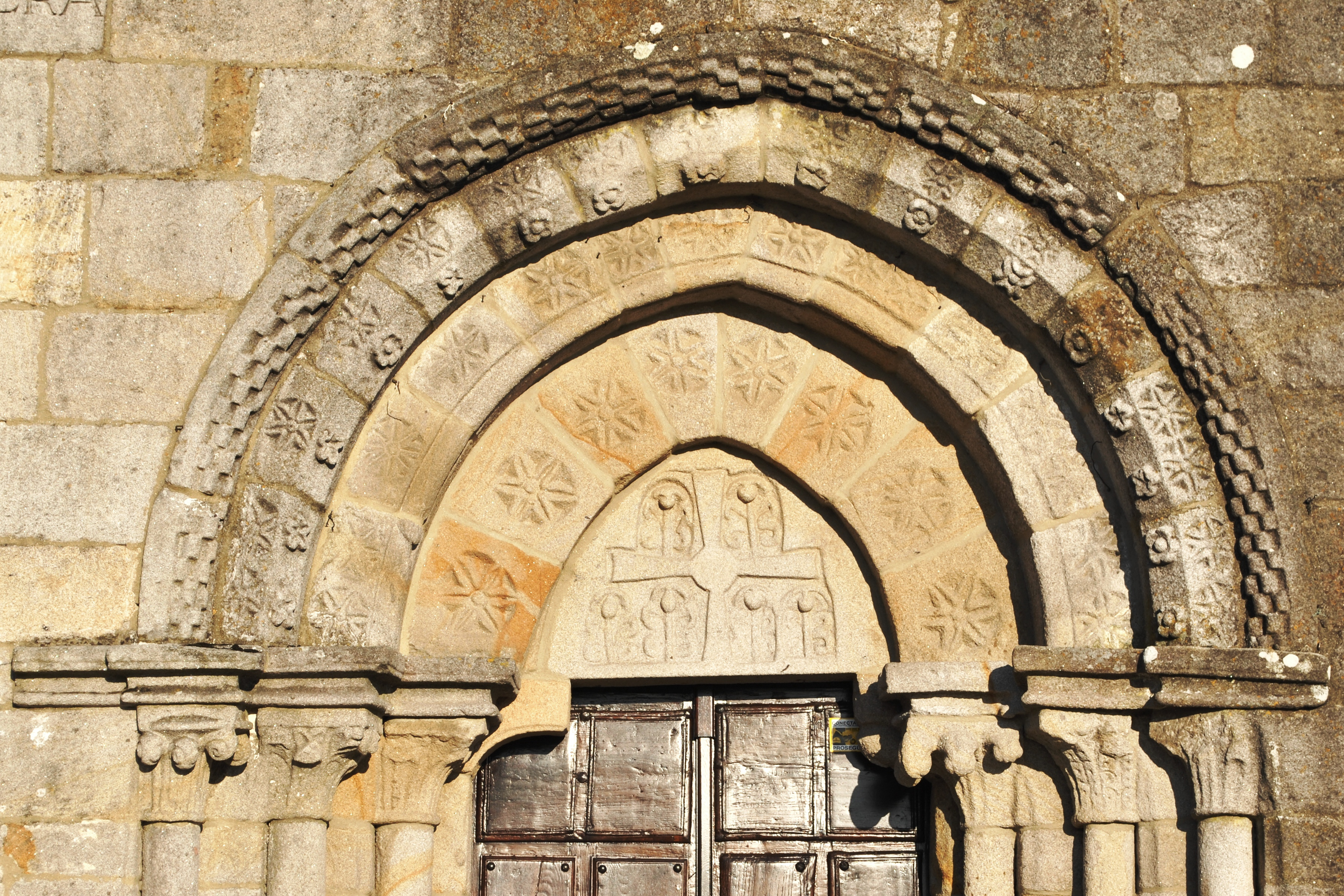 Vexa o título e as categorías.